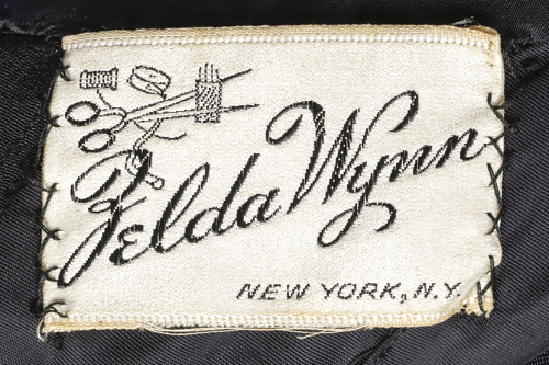 Etikett am Kleid Ella Fitzgerald, Designerin Zelda Wynn - New York